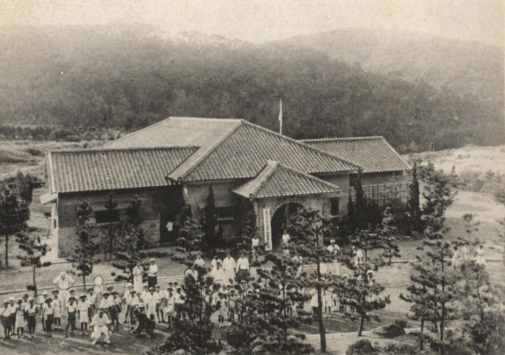 中文（台灣）: 位於陽明山，二戰後改建為青邨幹部訓練班基地。